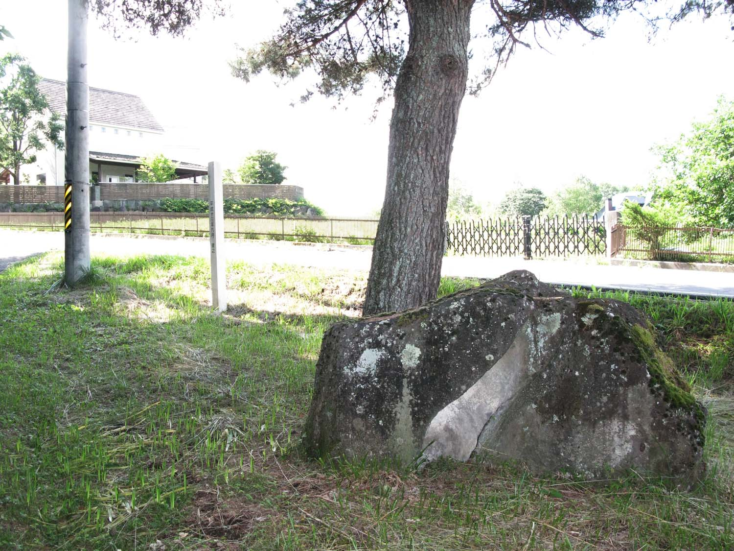 鬼石（長野県茅野市北山芹ケ沢）